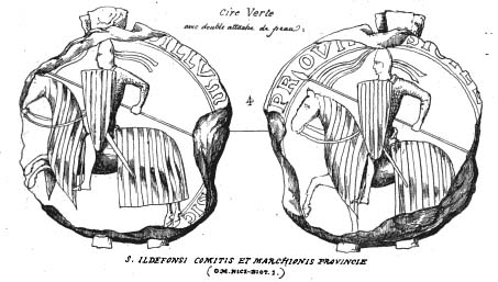 Segell de 1209 del comte Alfons II de Provença (1180-1209). (anvers i revers)